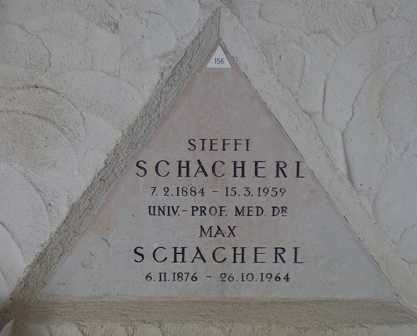 Feuerhalle Simmering - Arkadenhof (Abteilung ARI) - Grab des Psychiaters Max Schacherl